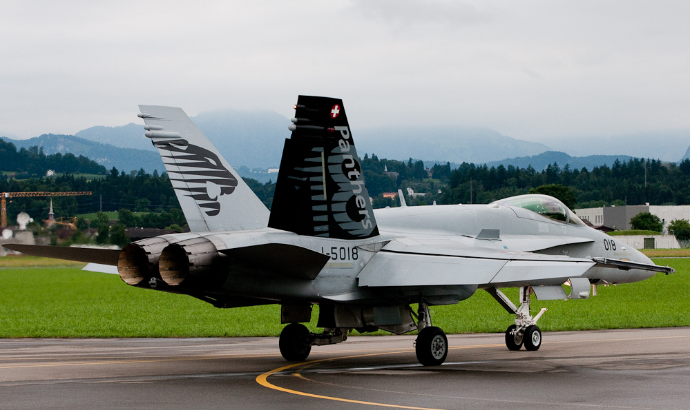 20100724-_DSC8637